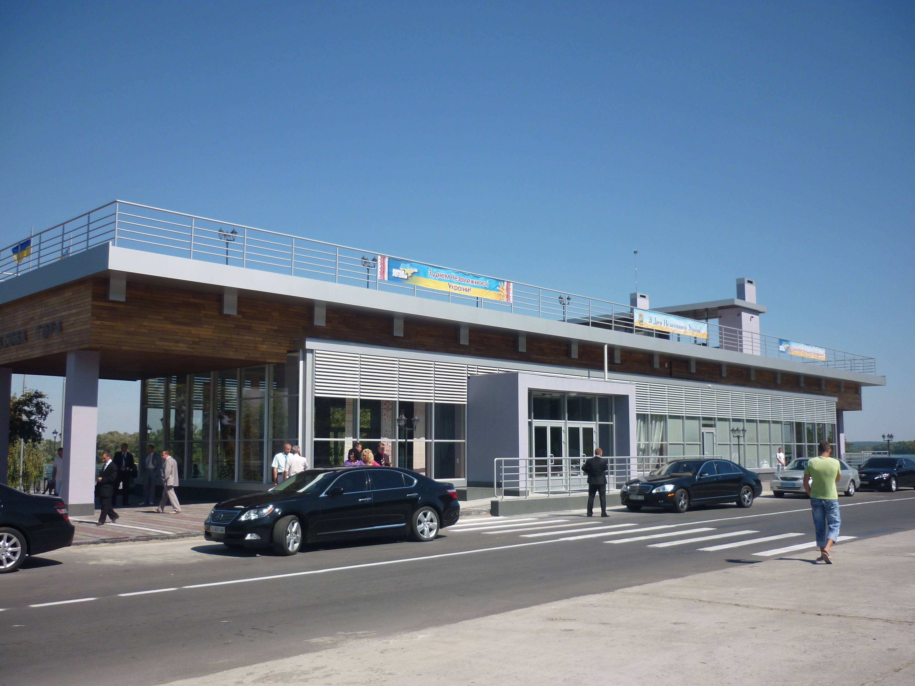 Місто Канів. Річковий вокзал